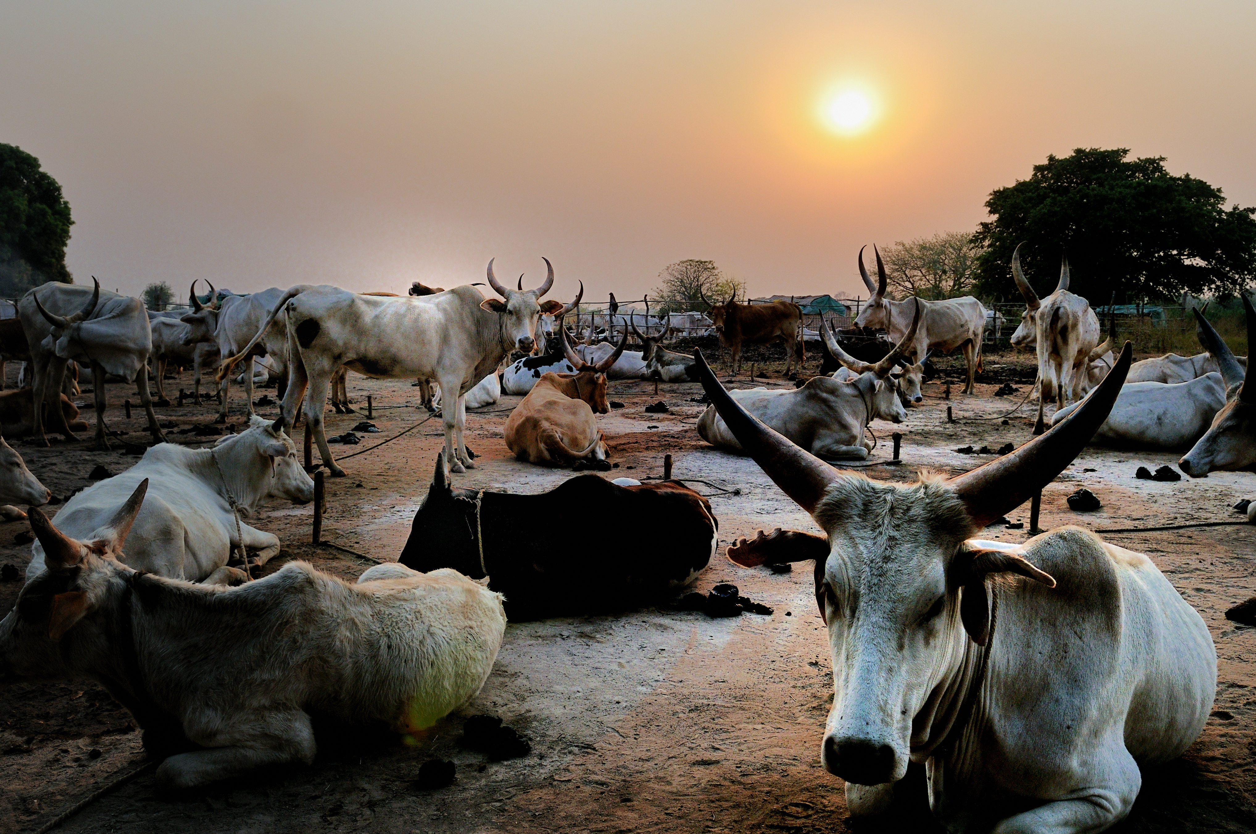 Dinka Catle, Wau, Sudan